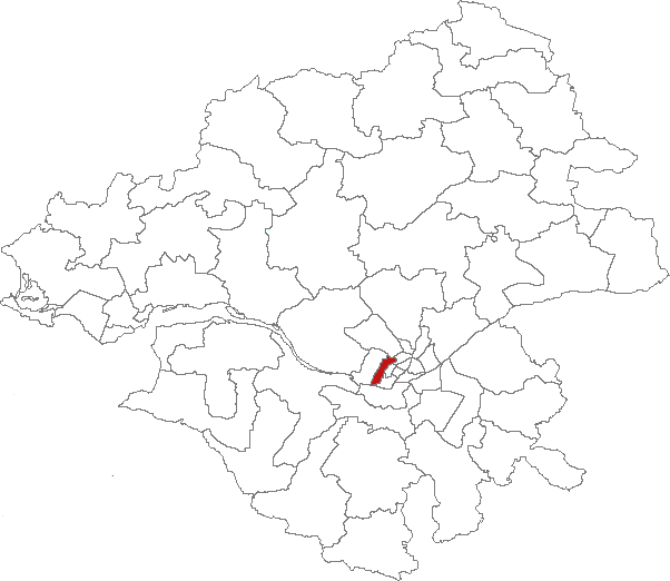 Carte de localisation du canton de Saint-Herblain-est (France, Loire-Atlantique)